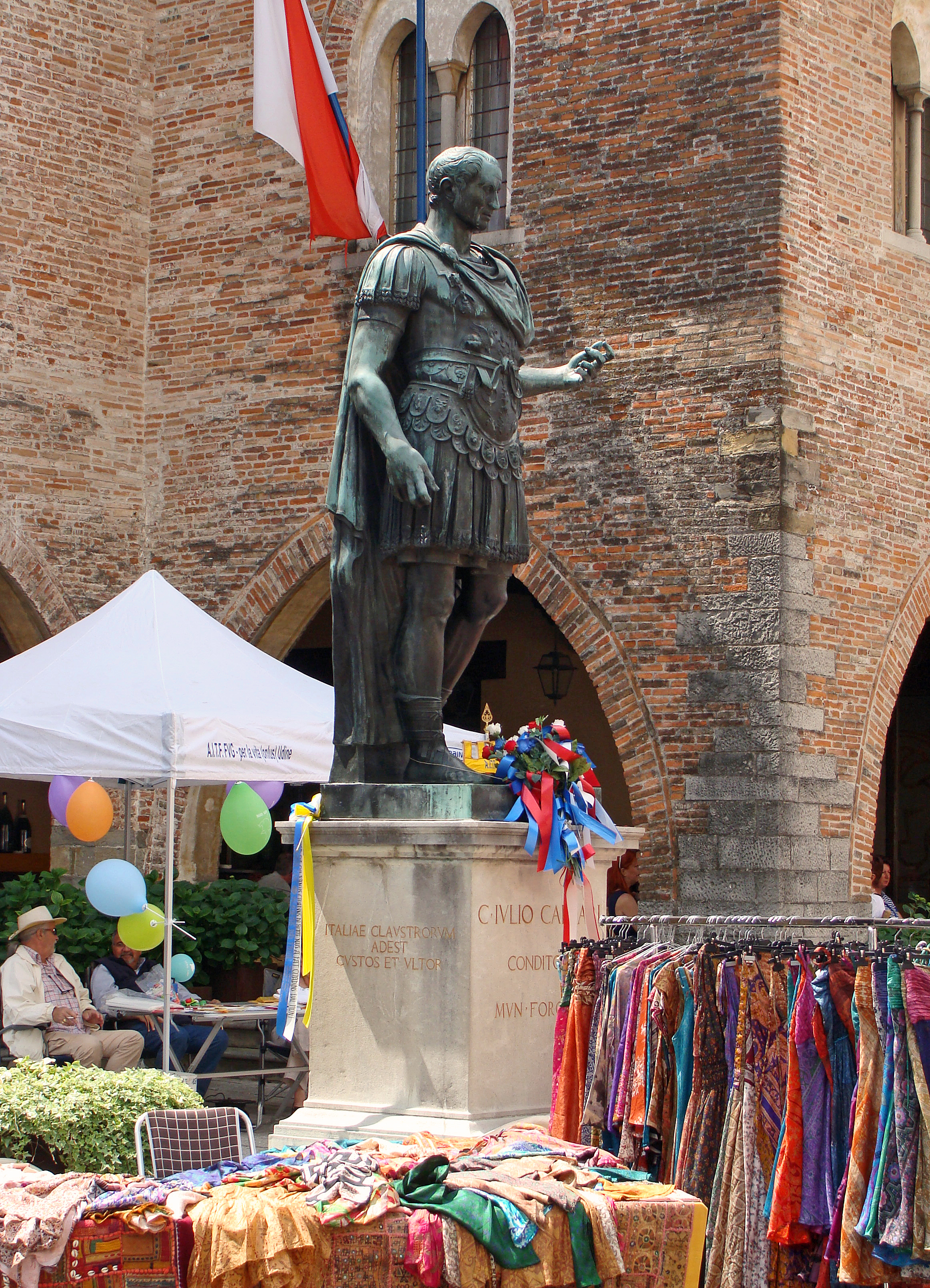 Statue de Jules César sur la place de la cathédrale à Cividale (Frioul-Vénétie julienne)